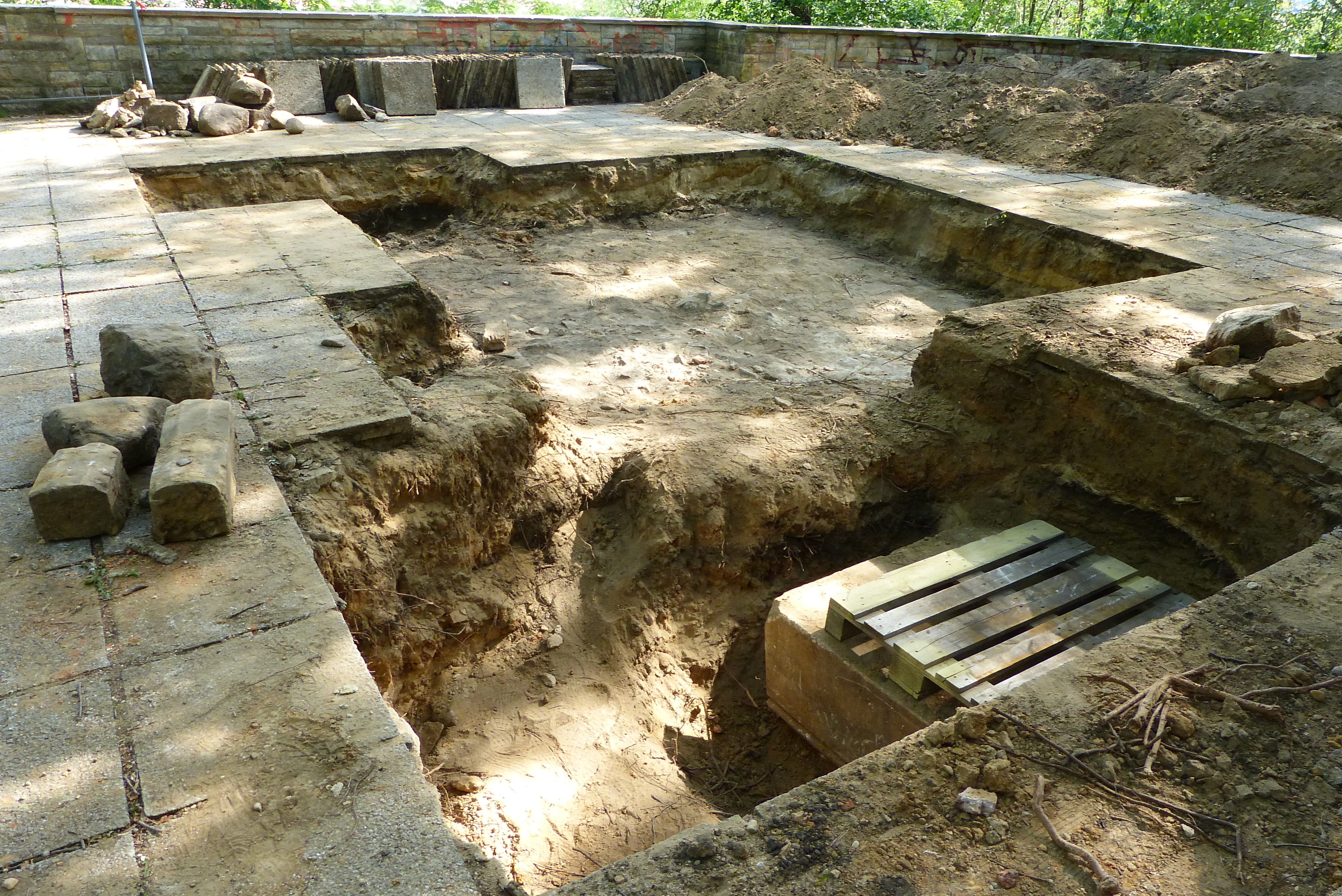 Fundstelle Teile Obelisk, Rechteck Bildmitte Fundament des Obelisken, Vorn noch nicht geborgene Sockelteil